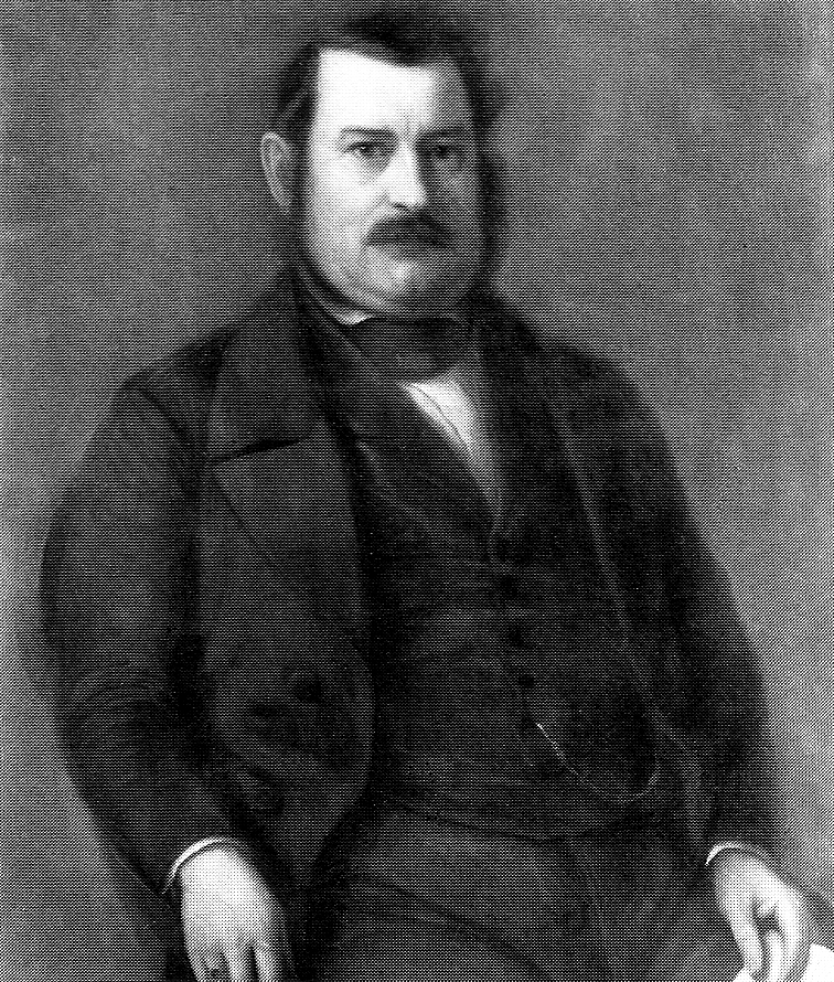 Carl Ostermünchner (1813-1868), Abgeordneter der Paulskirche